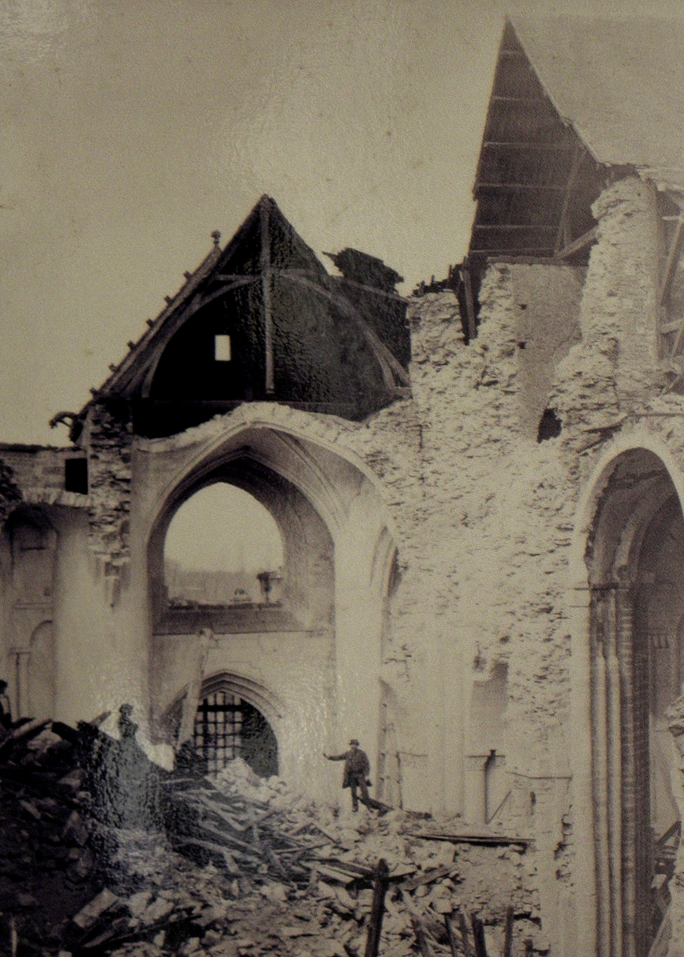 Ruine d' l'abbatiale Sainte-Croix de Quimperlé en 1862 après l'effondrement du clocher.